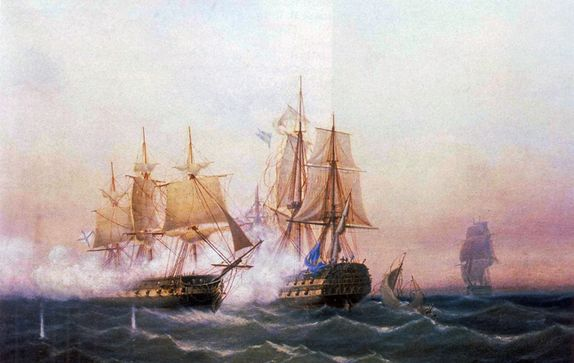 Карл Вальдемарович Шаренберг. Захват фрегатом «Венус» шведского линейного корабля «Ретвизан» 23 июня 1790 г. Холст. Масло. 70*108 см.